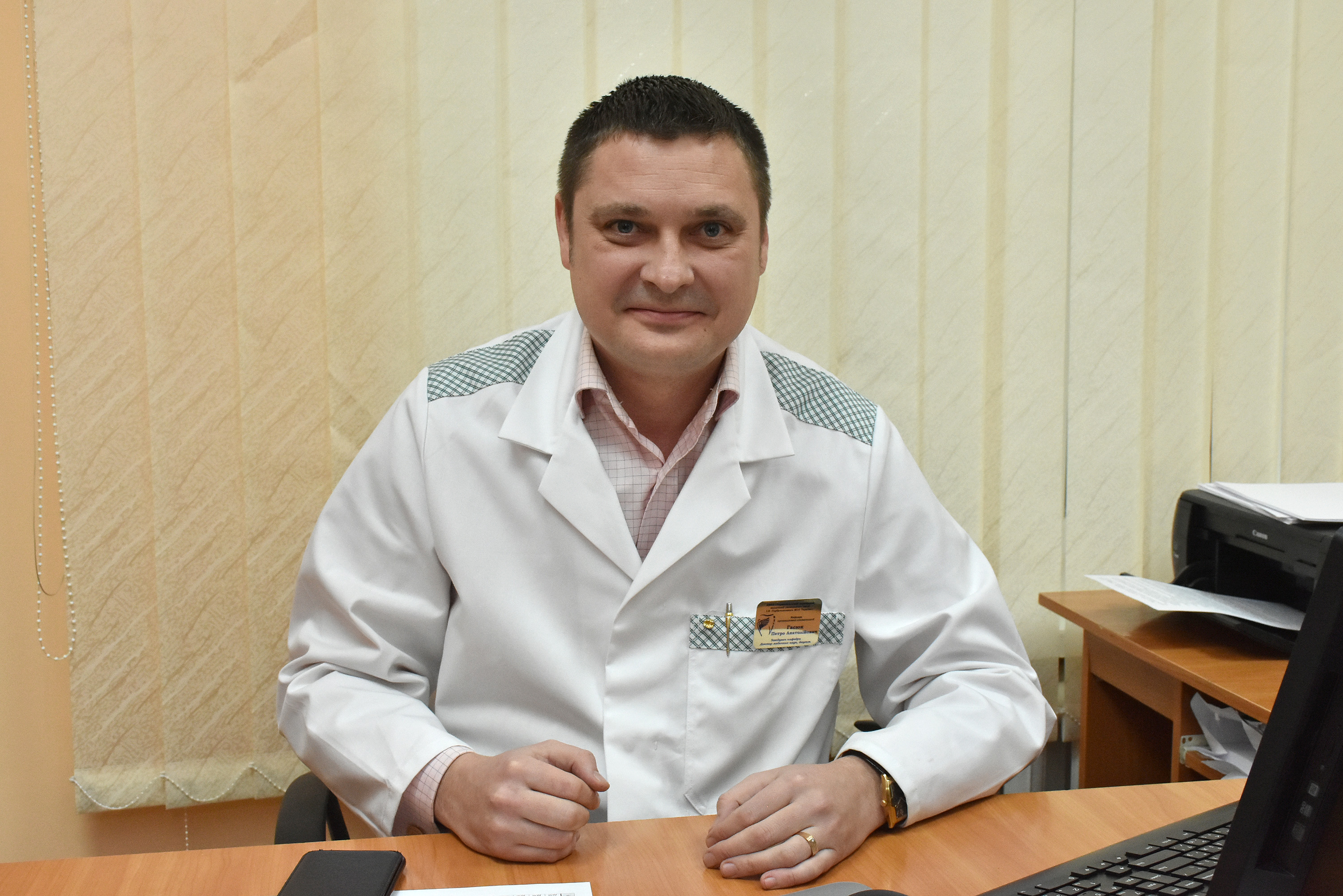 Український ортопед-стоматолог, педагог Петро Гасюк.